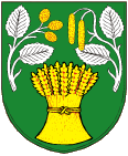 Znak obce Olšovec